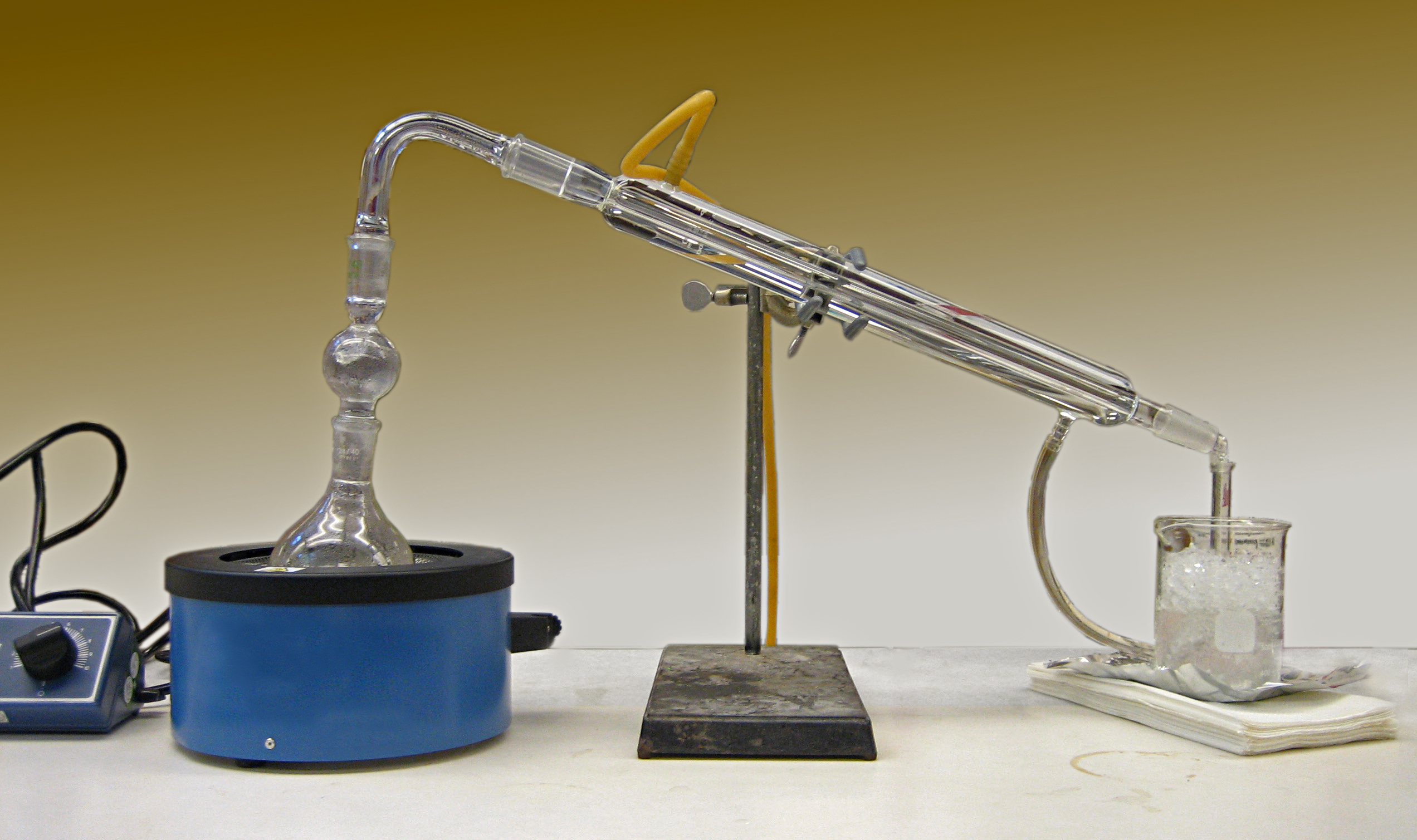 Distillation.